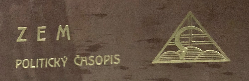 Zem politický časopis, 1935, logo